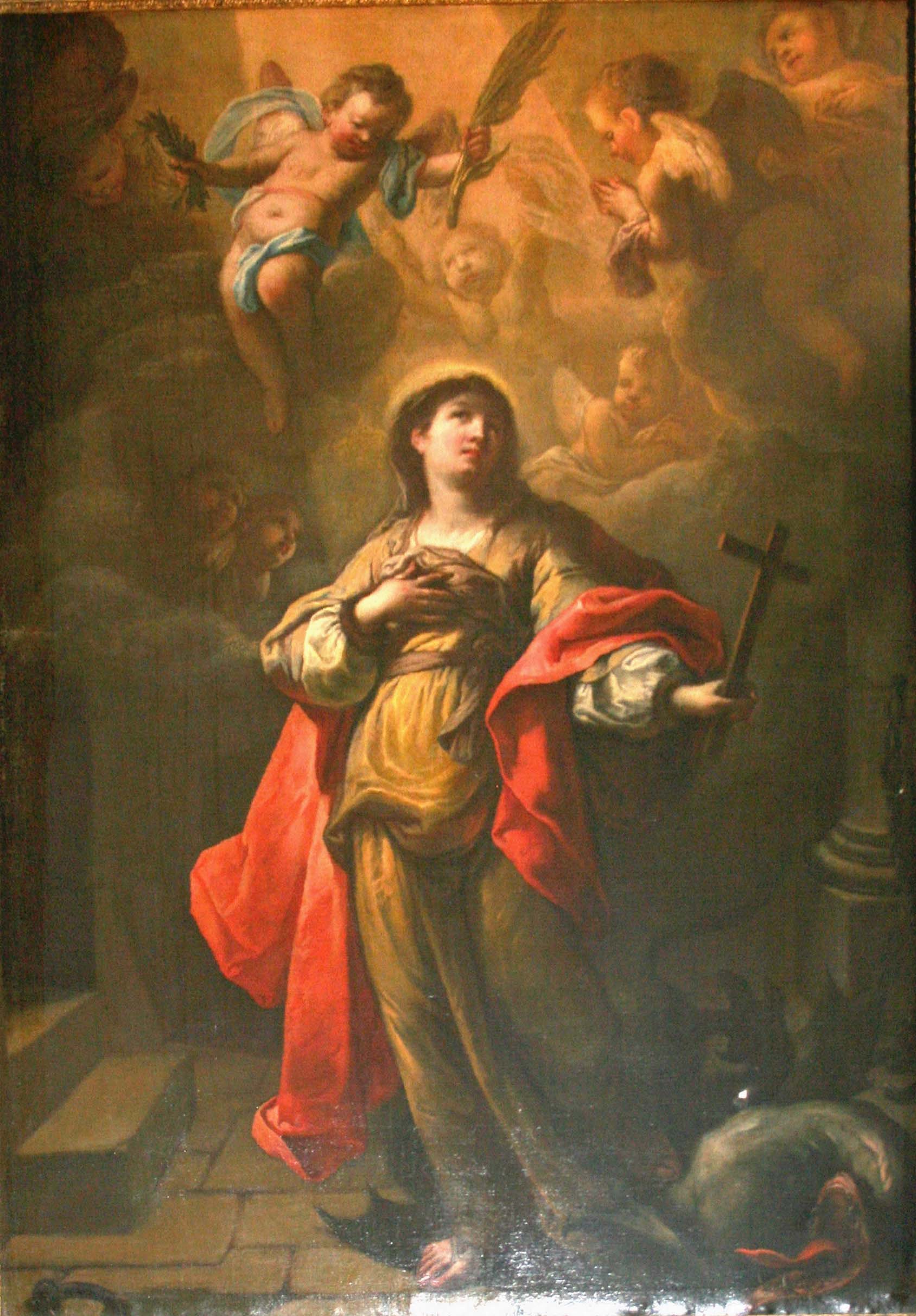 Tableau de Michel Serre (1658-1733) représentant Sainte Marguerite se trouvant dans l'église des Augustins à Marseille, quai des Belges.